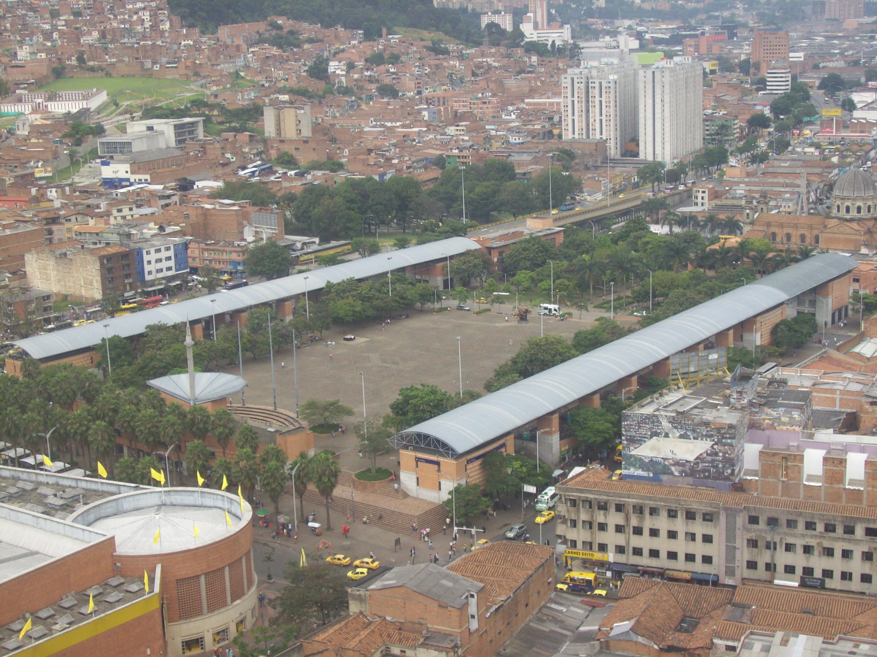 Vista del Parque de San Antonio desde el Edificio del Café, Medellín.